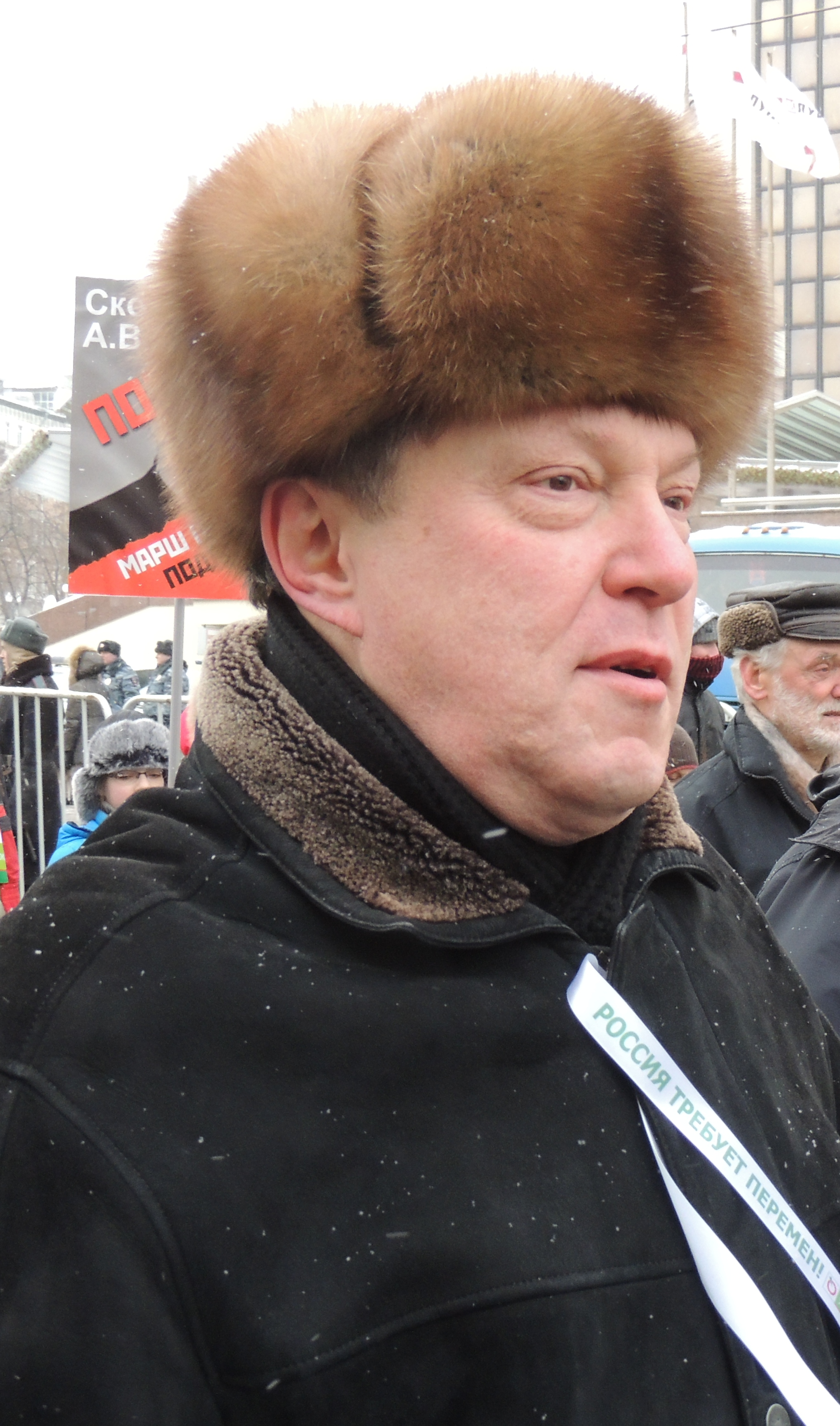 Григорий Явлинский на марше оппозиции 13 января 2013 года в Москве